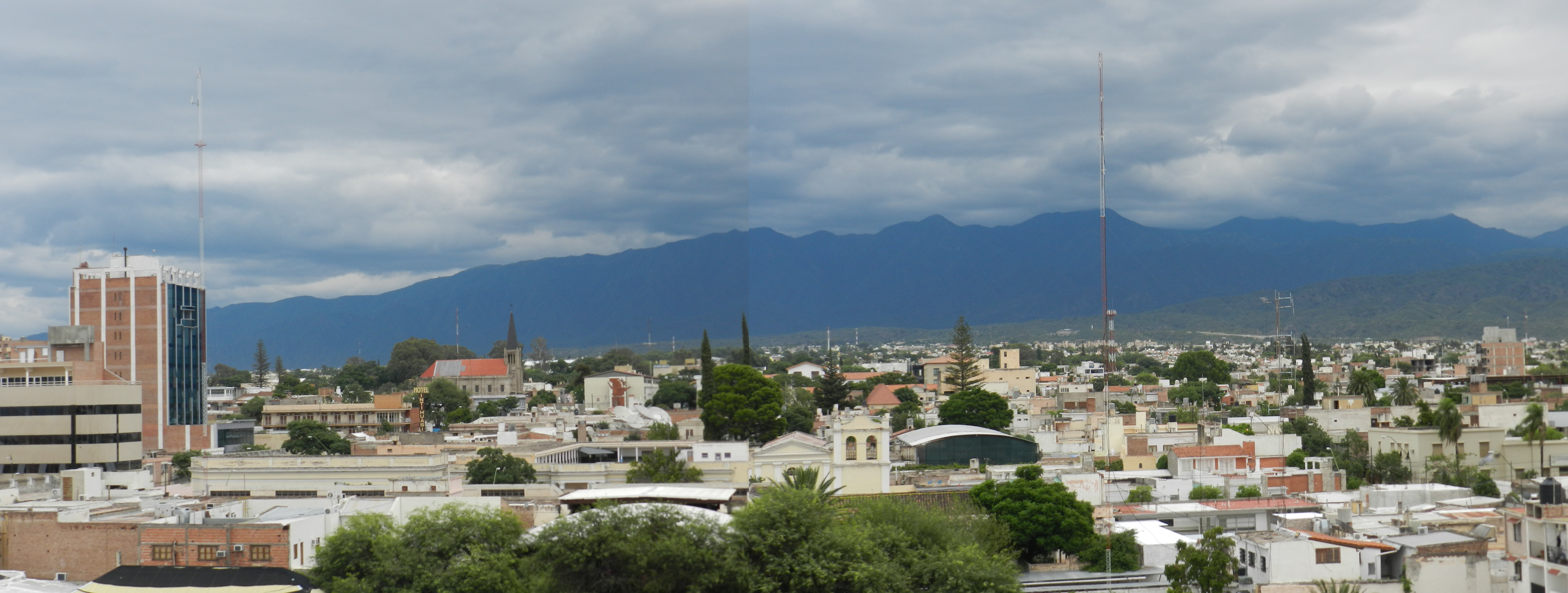 Vista de la ciudad